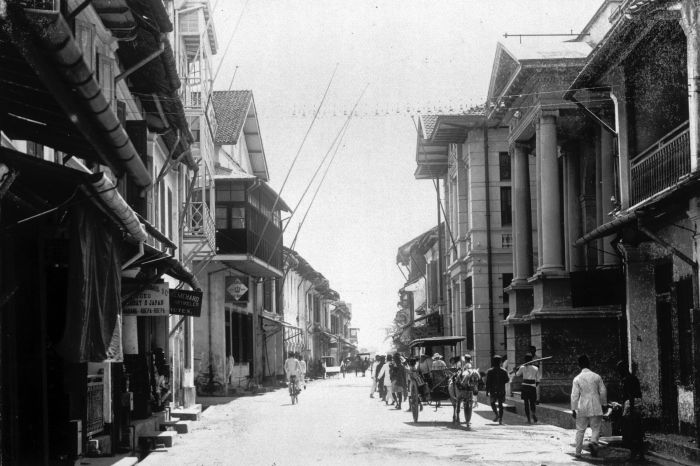 Foto. Makassar was de grootste stad van Celebes. In 1930 had de stad bijna 85.000 inwoners, waarvan bijna 3.500 Europese. In de Buitengewesten (alle eilanden buiten Java) was alleen Palembang groter. De stad was snel gegroeid, sneller dan veel Indische steden. In 1890 stond Makassar nog op de vierde plaats van de steden in de Buitengewesten, en had het, naast Palembang, ook Padang en Bandjermasin moeten laten voorgaan. Die groei kwam niet zo zeer voort uit de productie van de regio zelf als wel door de rol van Makassar in de handel, waaronder veel doorvoerhandel. Op de foto de straat waar de markt (pasar) was (of geweest was) met rechts een opvallende classicistische gevel. (P. Boomgaard, 2001). De Passarstraat te Makassar.